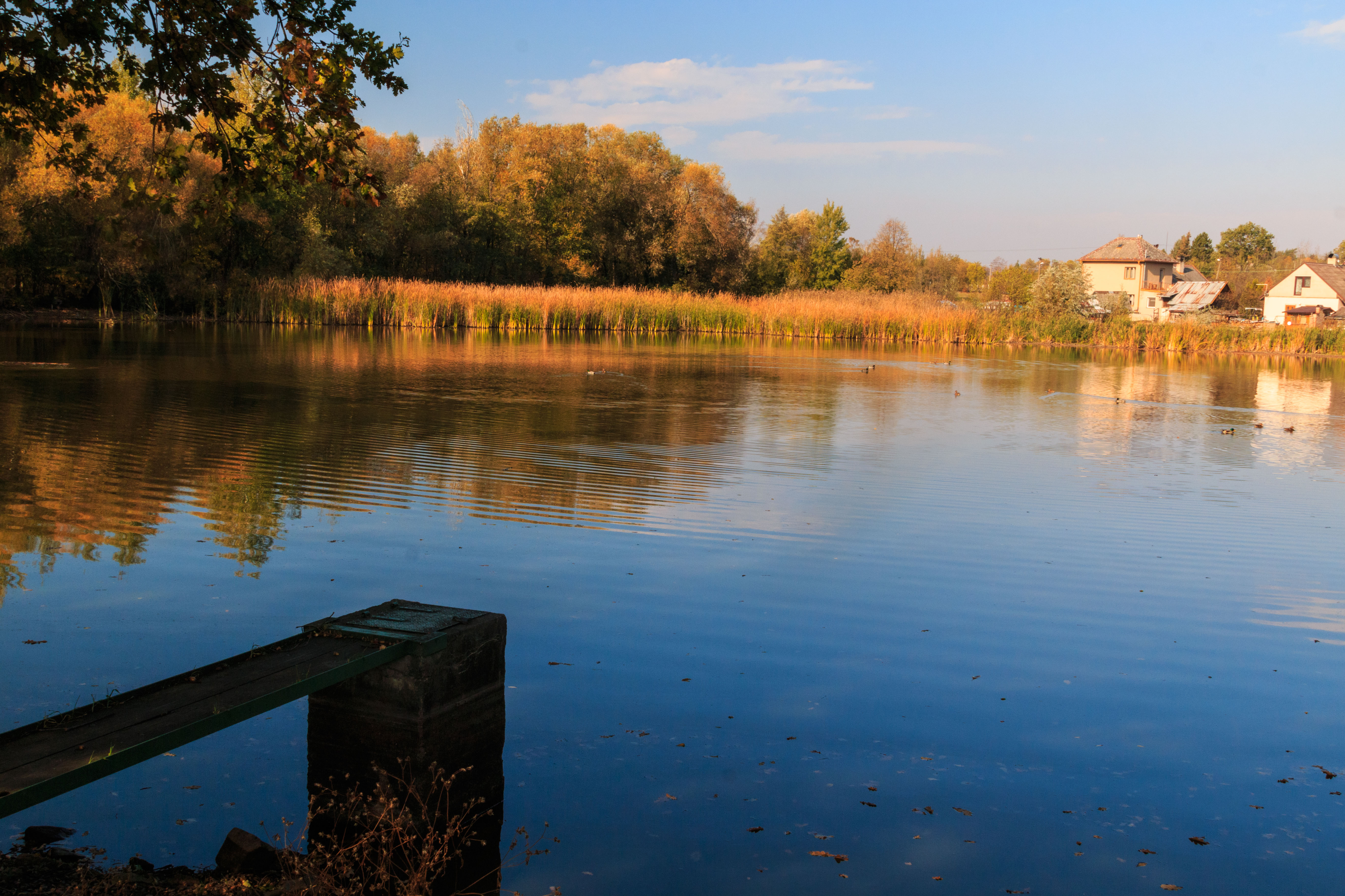 Drahotický rybník Project: Vodstvo. Ticket: 1618.